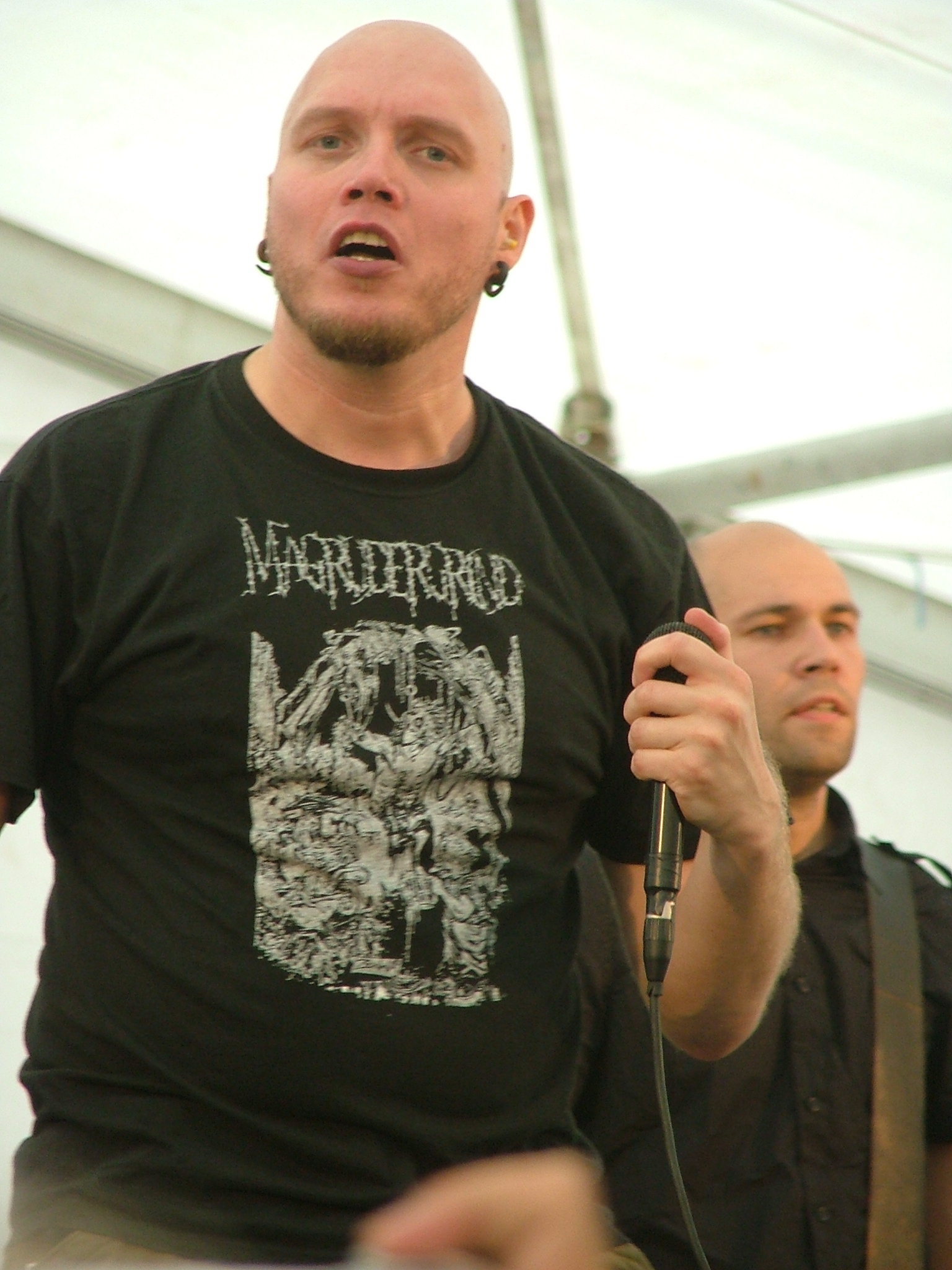 Finnische Grindcore-Band Rotten Sound beim Kuopio Rockcock